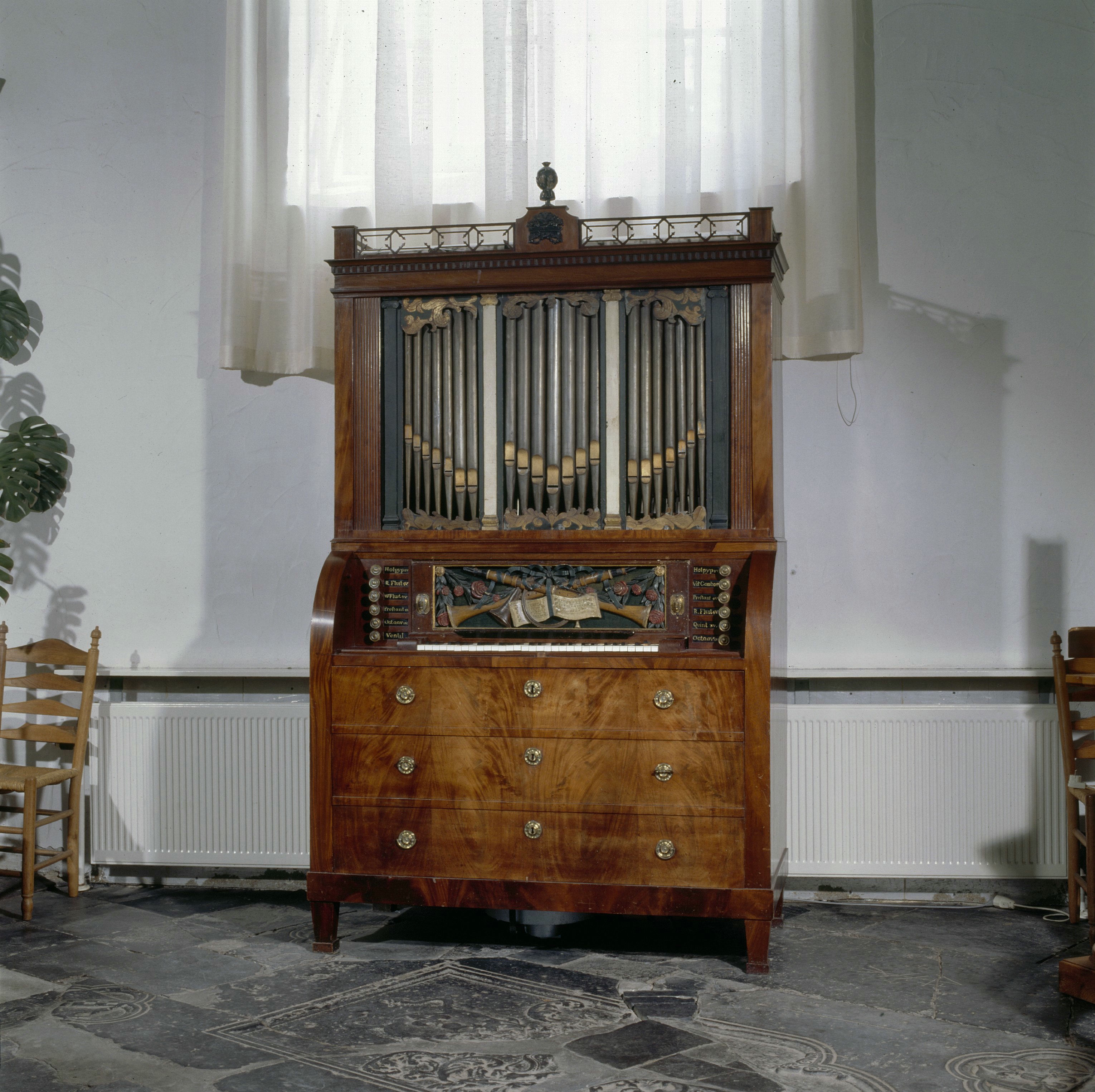 Nederlands Hervormde Kerk: Interieur, aanzicht kabinetorgel als koororgel, orgelnummer 649 (opmerking: Gefotografeerd voor Het Historische Orgel in Nederland 1790-1818)